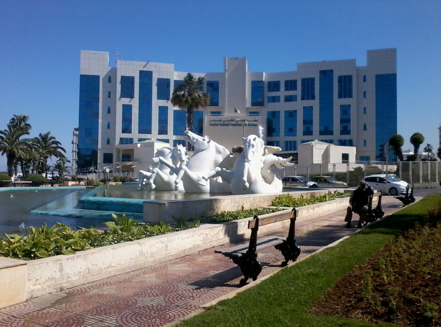 معهد الموسيقى بالقصبة